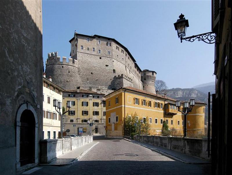 Rovereto, il Castello visto da Santa Maria